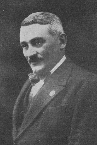 Antonio Minto